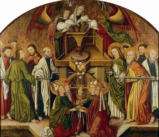 Hostienmühlenretabel (Hostienmühle), detail